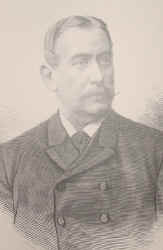 Adolf MvB Privatbesitz